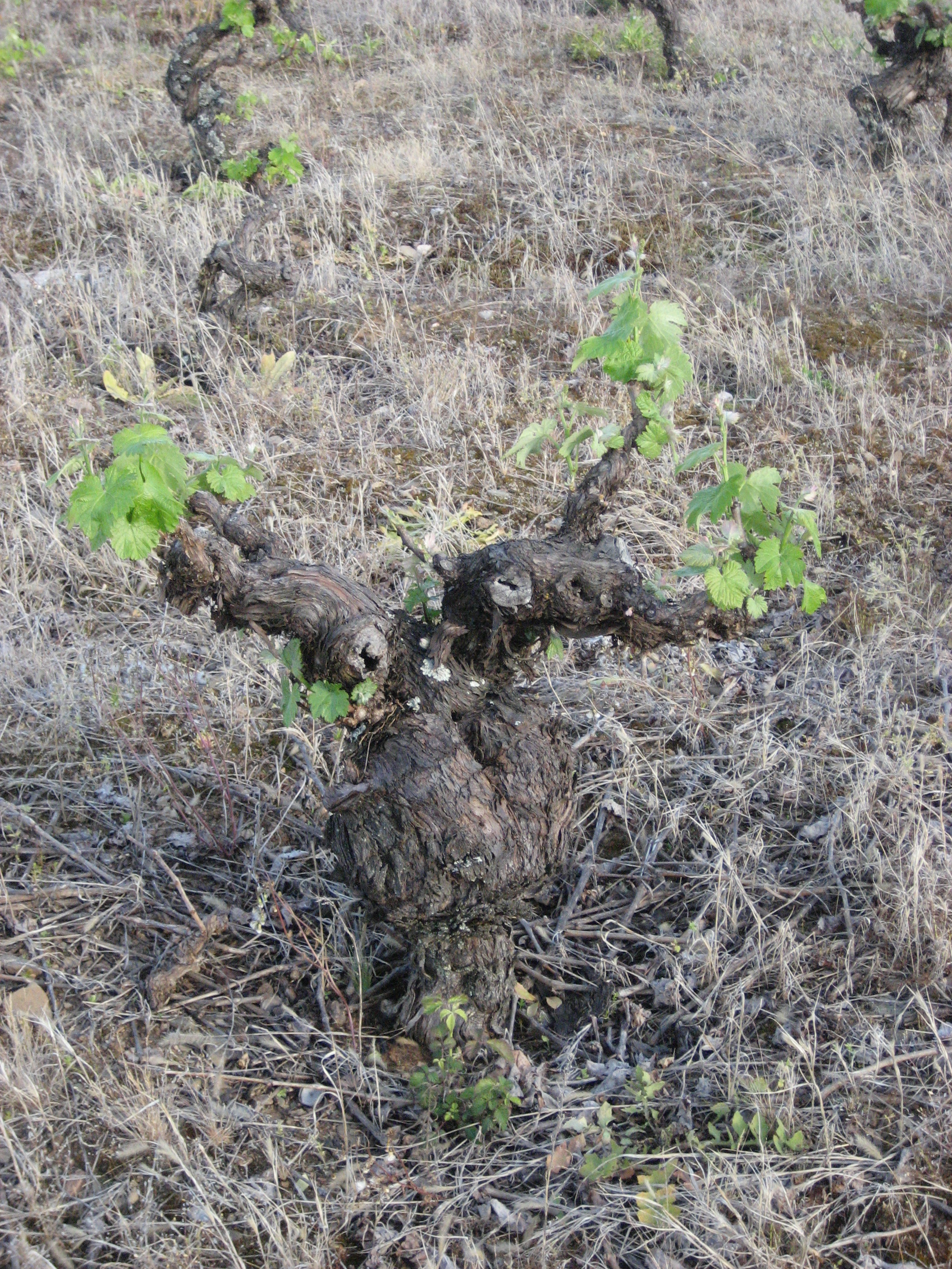 Cepa de la vid en mayo (San Lorenzo del Bierzo, León, España)